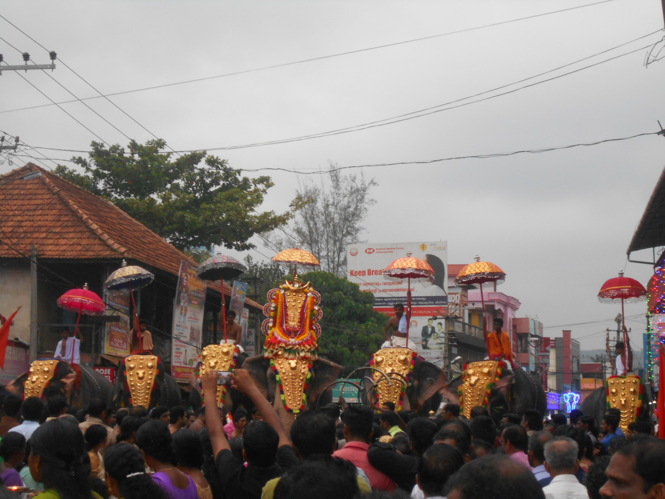 ഓമല്ലൂർ ശ്രീരക്തകണ്ഠസ്വാമി ക്ഷേത്രത്തിലെ പൂരത്തോടനുബന്ധിച്ചുള്ള ആറാട്ടെഴുന്നള്ളത്തിൽ നിന്ന്.